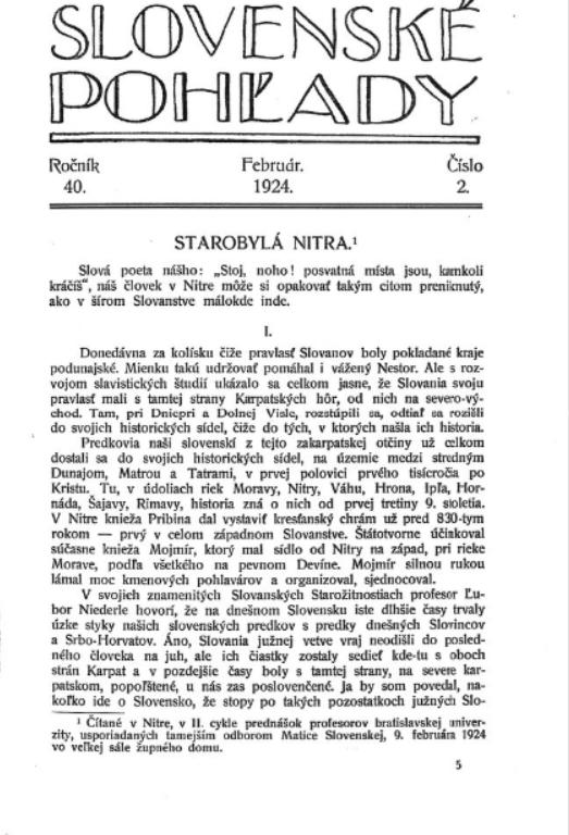 Titulný list slovenského periodika Slovenské pohľady z r. 1924